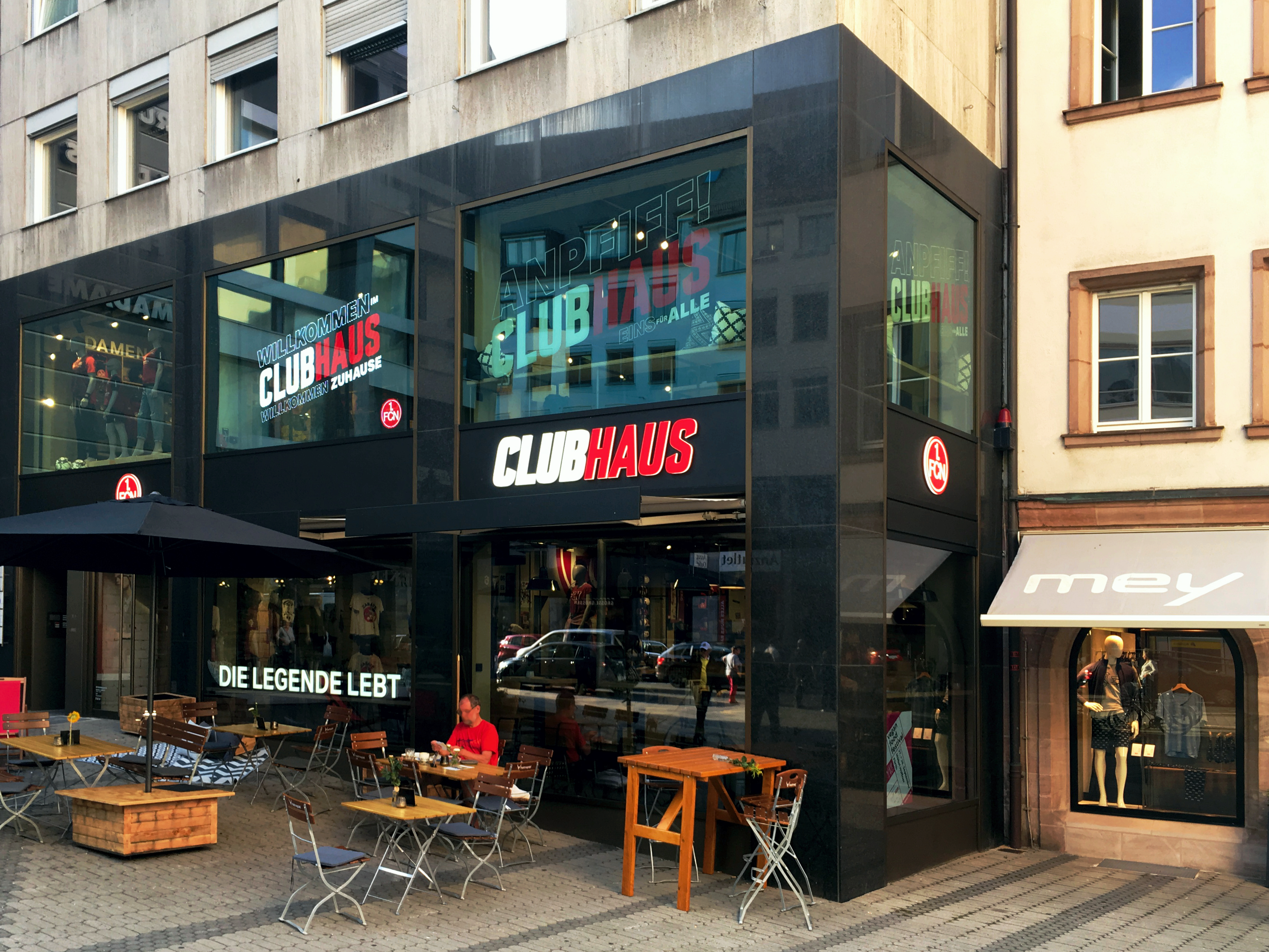 Clubhaus am Jospehsplatz in Nürnberg